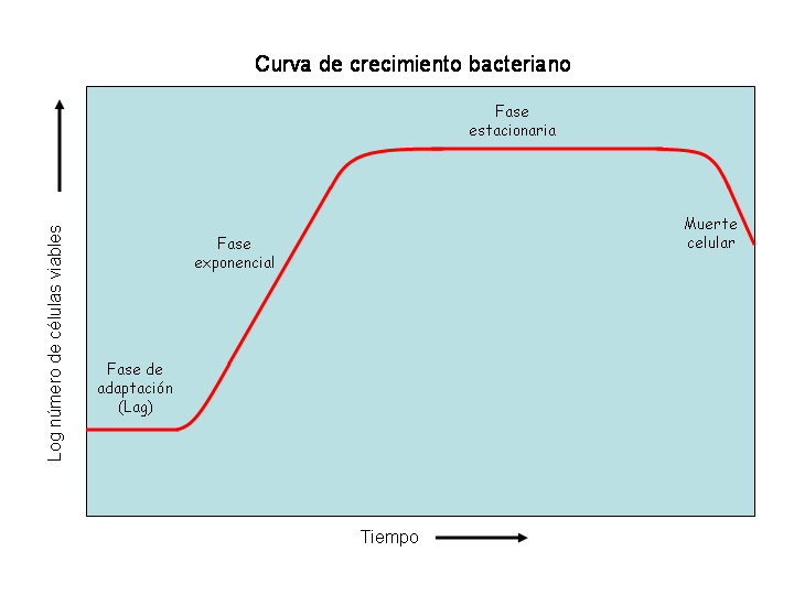 Curva de crecimiento bacteriano